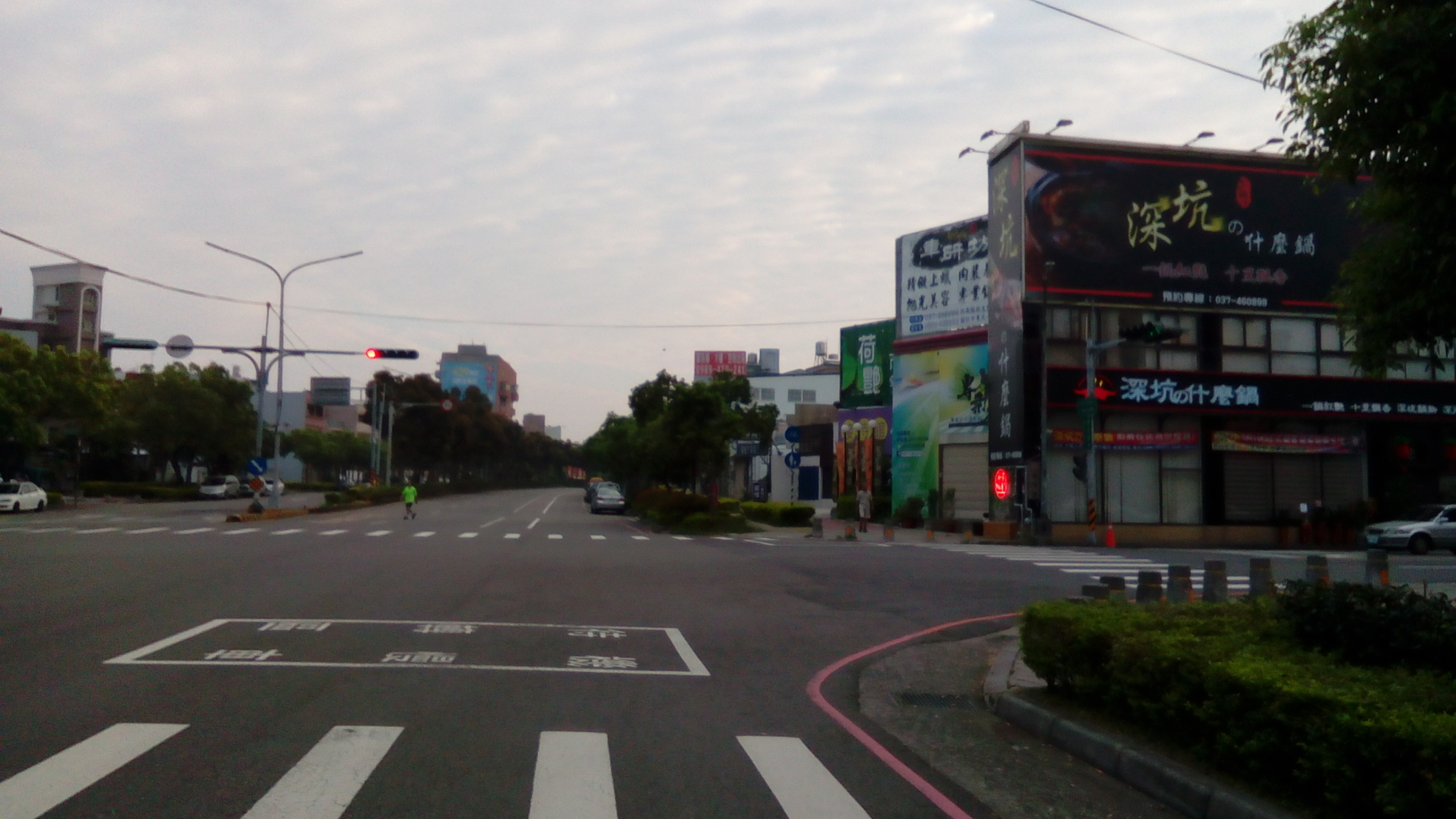 台13甲線 環市路二段